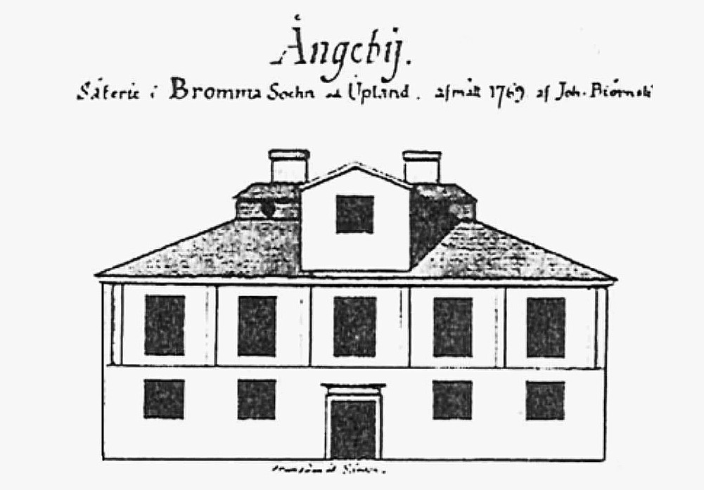 Stora Ängby herrgård, uppmätning av Joh. Björnek